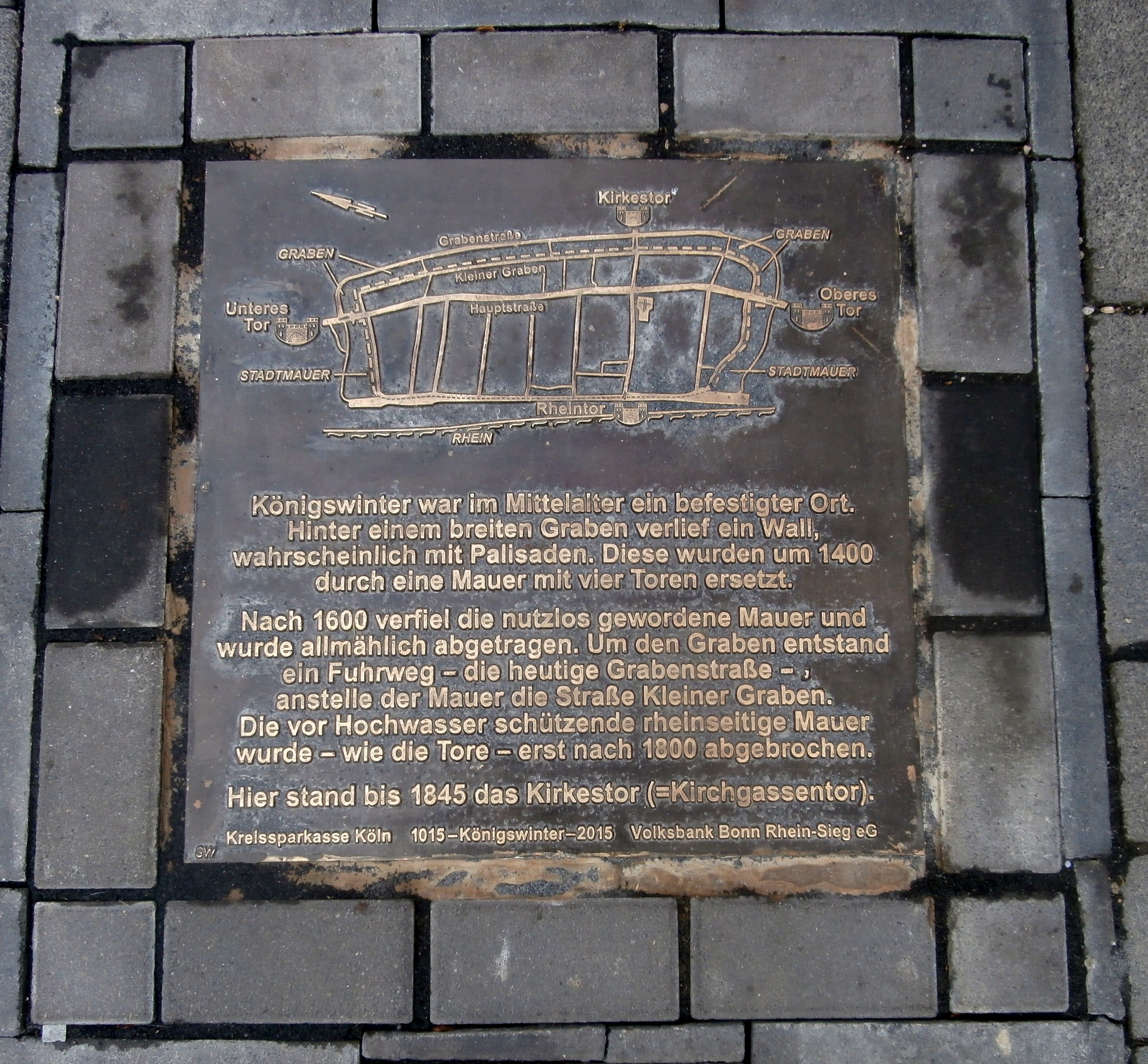 Bodenplatte (2015; Künstlerin: Sigrid Wenzel) zur Erinnerung an das Kirkestor, Drachenfelsstraße, Königswinter